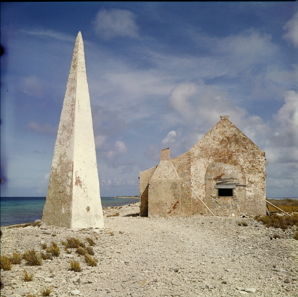 Dia.